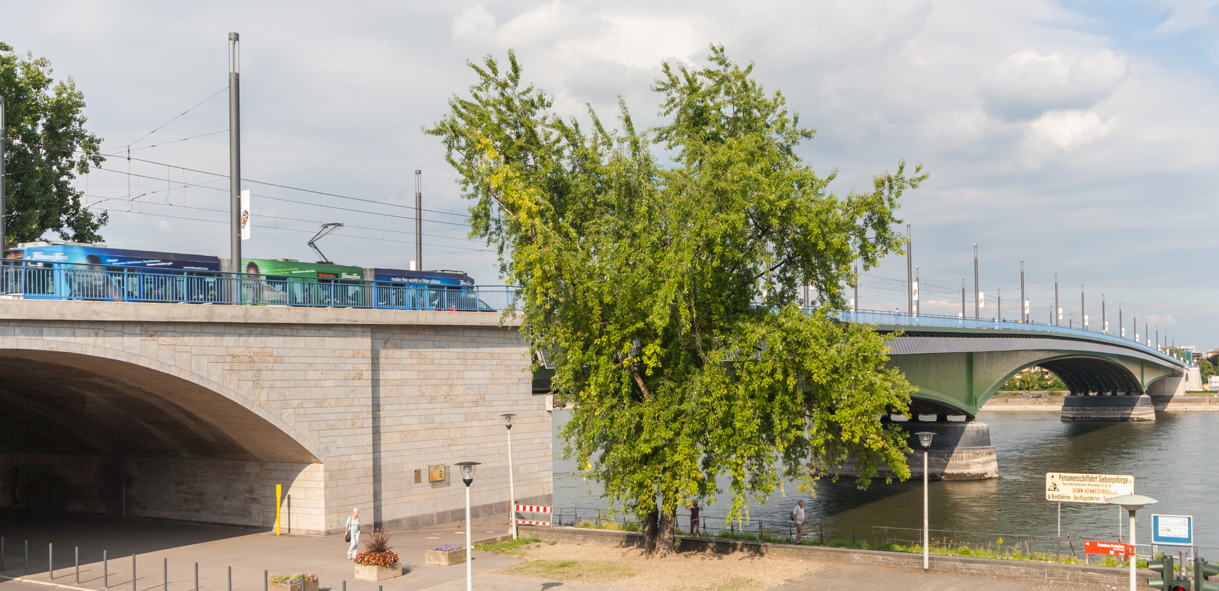 Kennedybrücke, Bonn-Zentrum